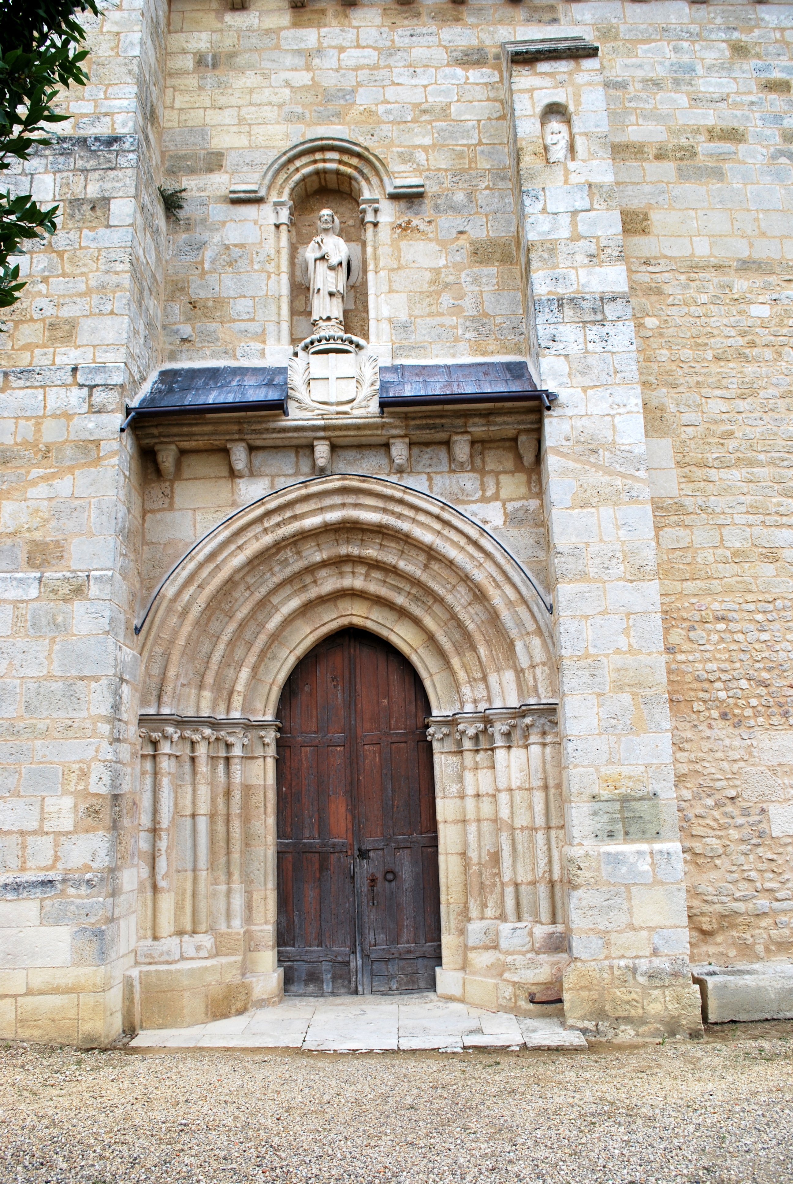 La Sauve église Saint-Pierre